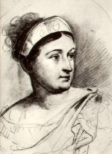 Семенова Екатерина Семеновна (в роли Клитемнестры, В А. Тропинин, с гравюры Н.И. Уткина, по оригиналу О.А. Кипренского, 1815 - 1816)